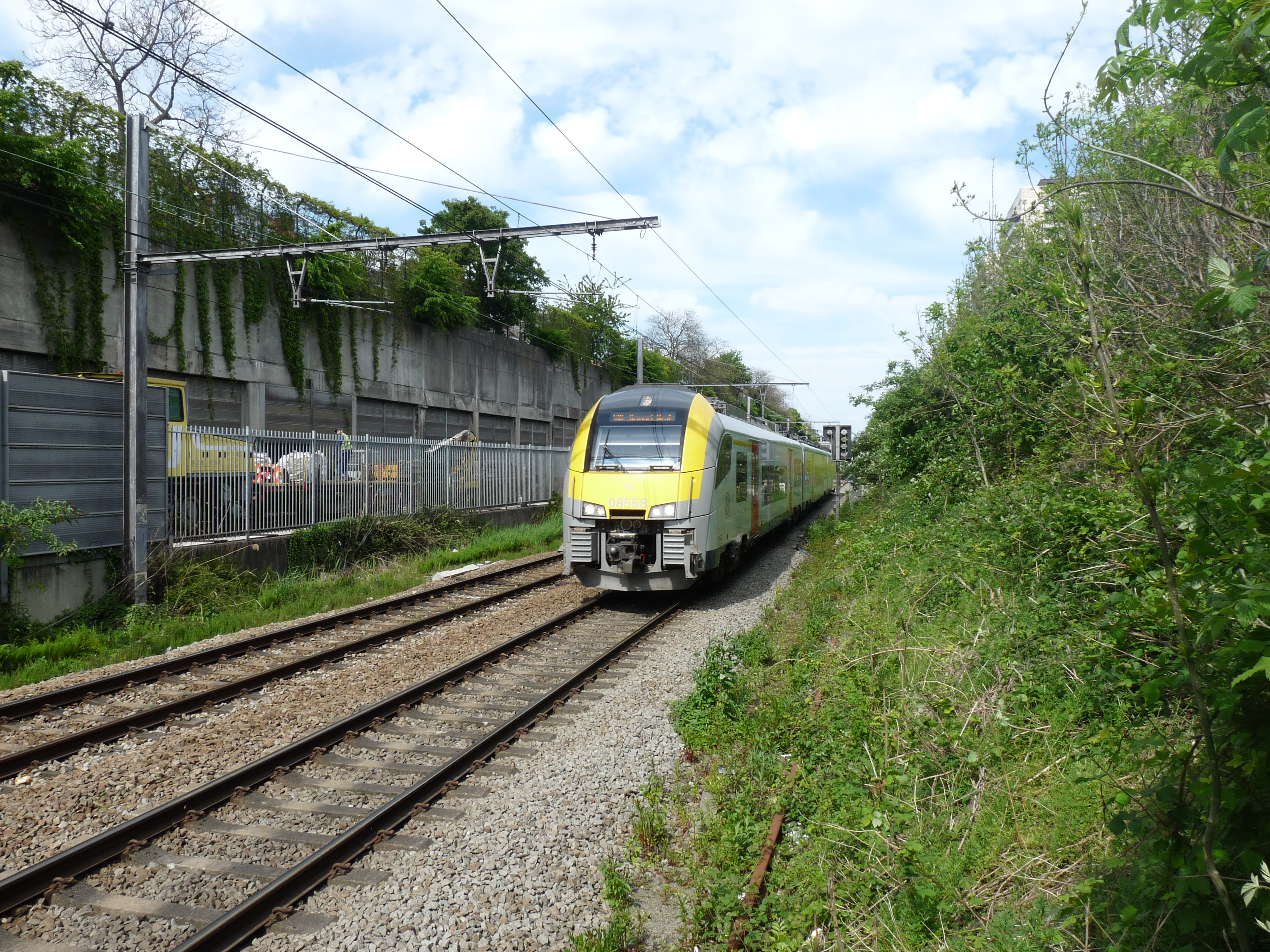 Omgeleide trein op de Westringspoor tijdens werkzaamheden op de Noord-Zuid verbinding